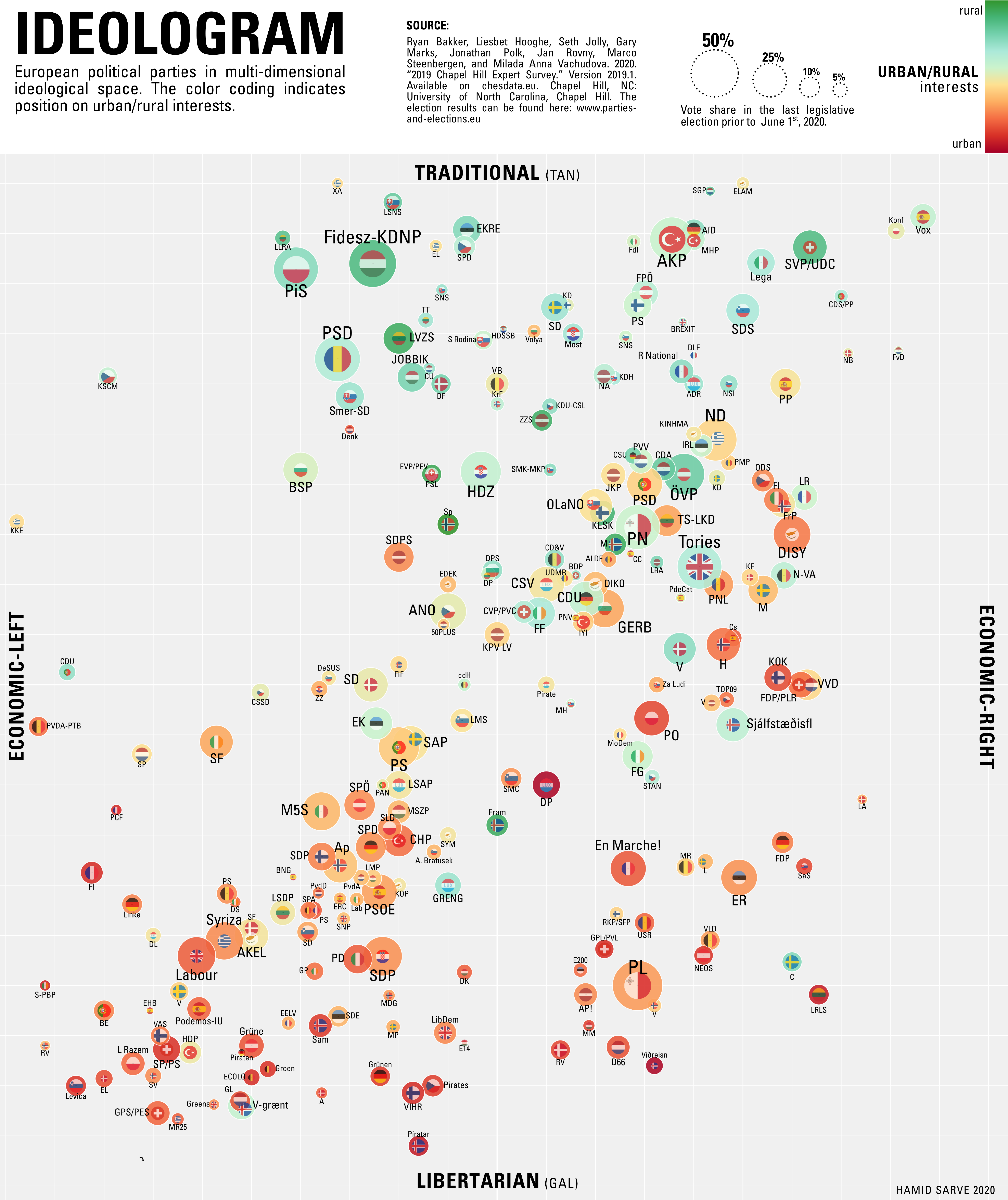 European parties in multi-dimensional political space.